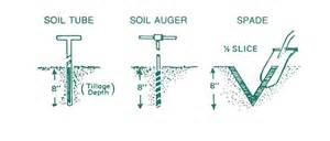 மண்மாதிரி எடுக்கும் ஆழம்